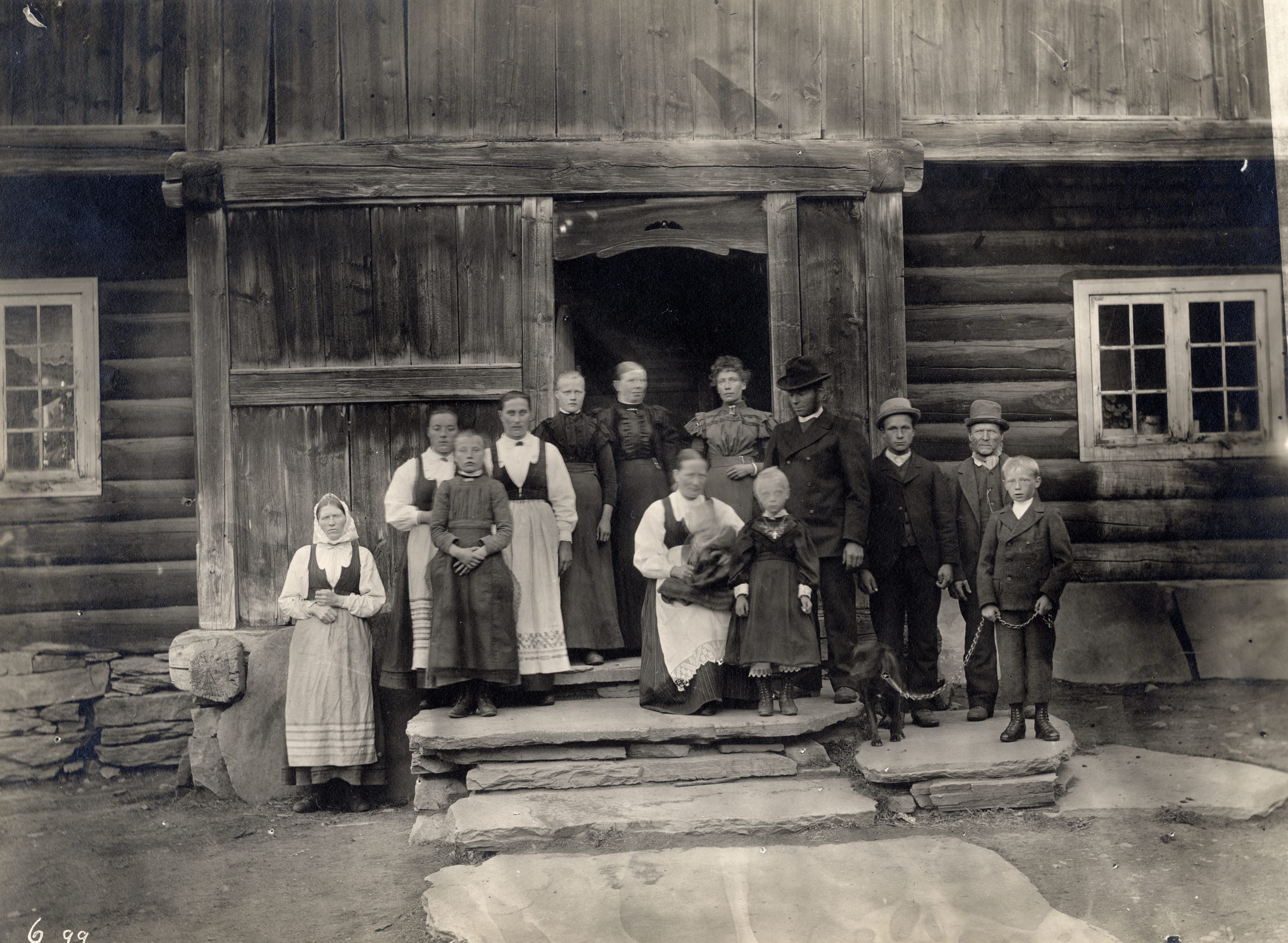 Hæringstad, Heringstad i Heidal, Oppland This image on crowdsourcing geotagging platform Fotodugnad